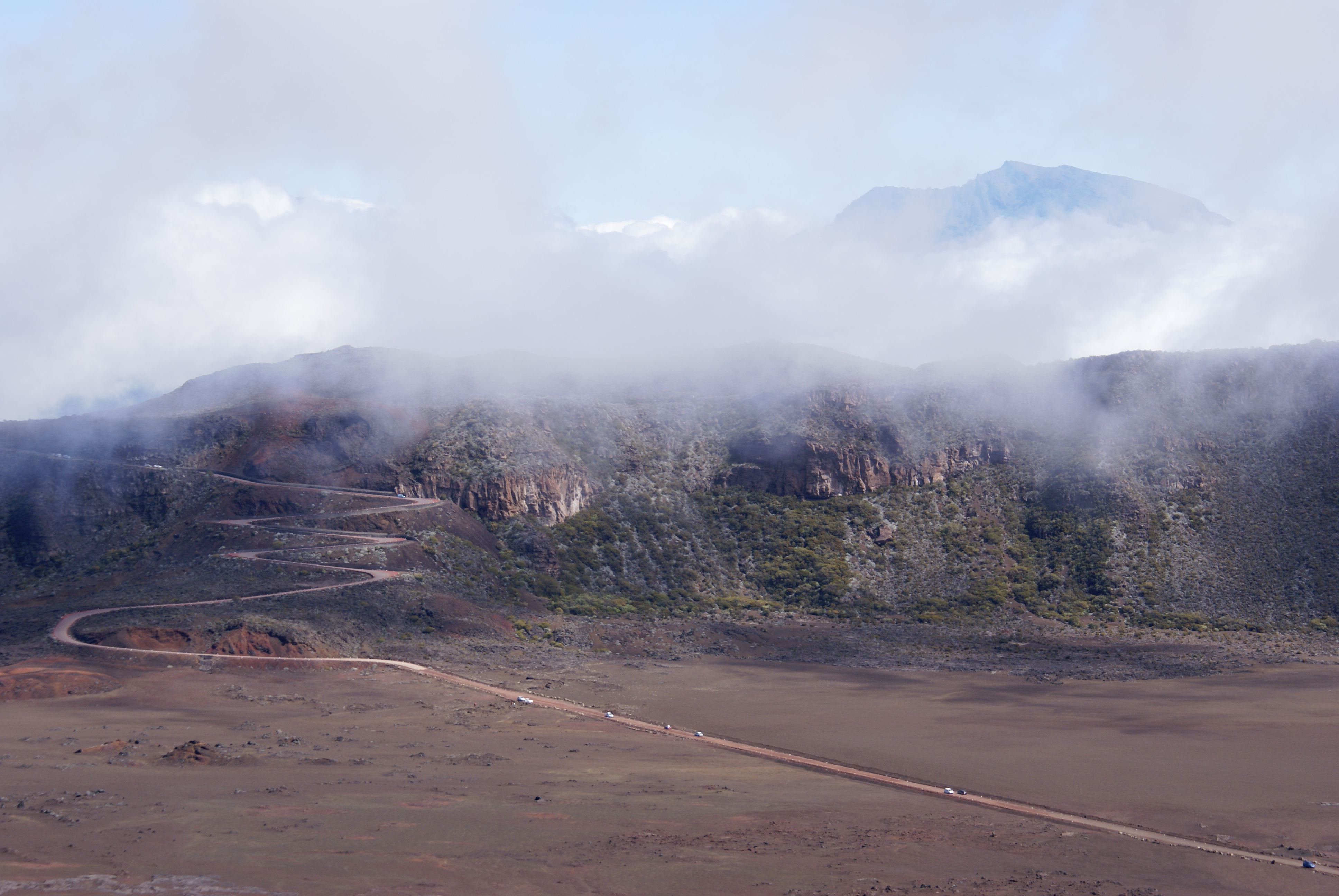 La route forestière du Volcan, la Plaine des Sables et le Pas des Sables, vus du sommet du Piton Chisny